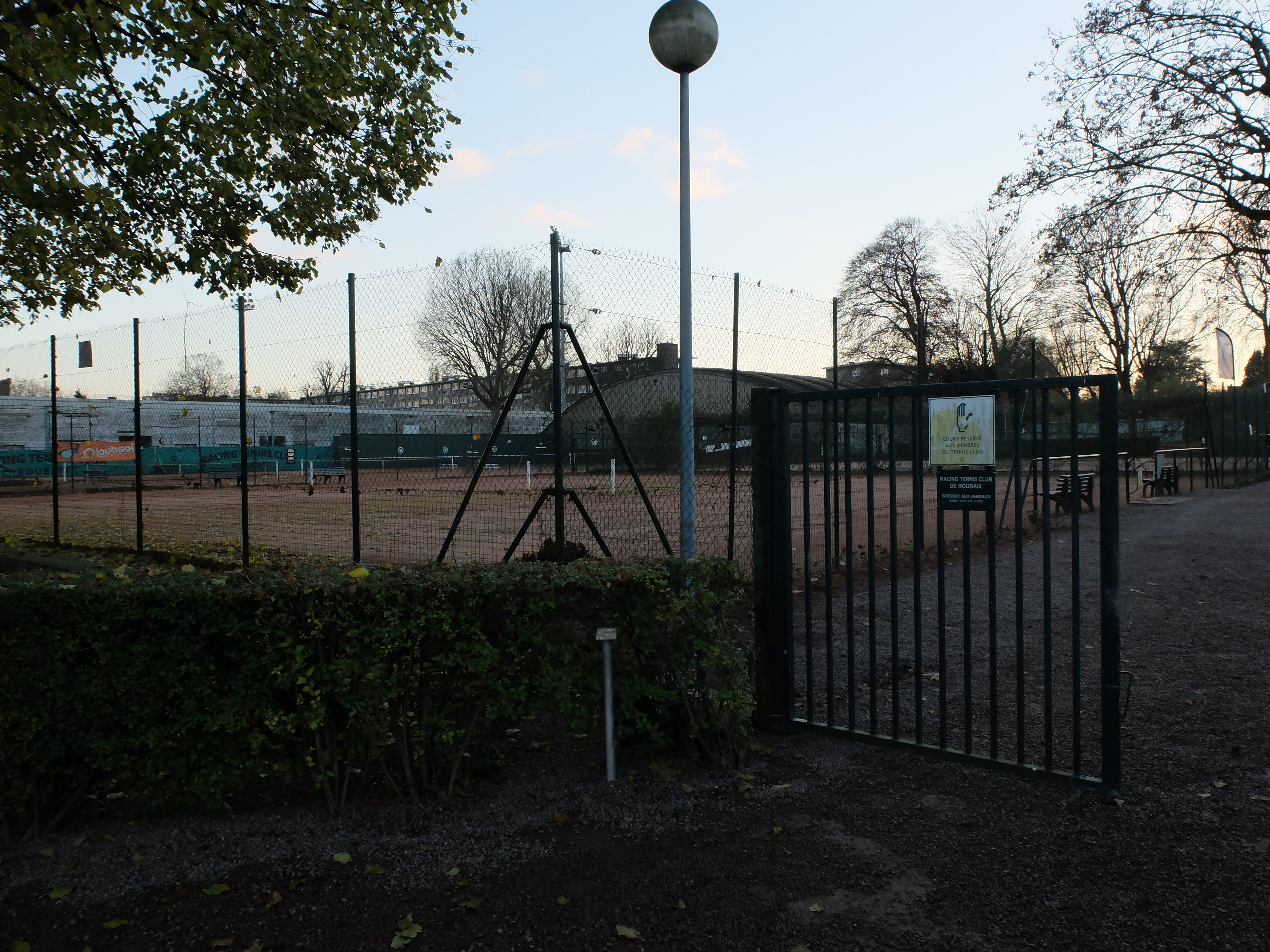 Vue des installations du Racing Tennis Club de Roubaix. Au fond à gauche se situe la tribune du stade Dubrulle-Verriest.